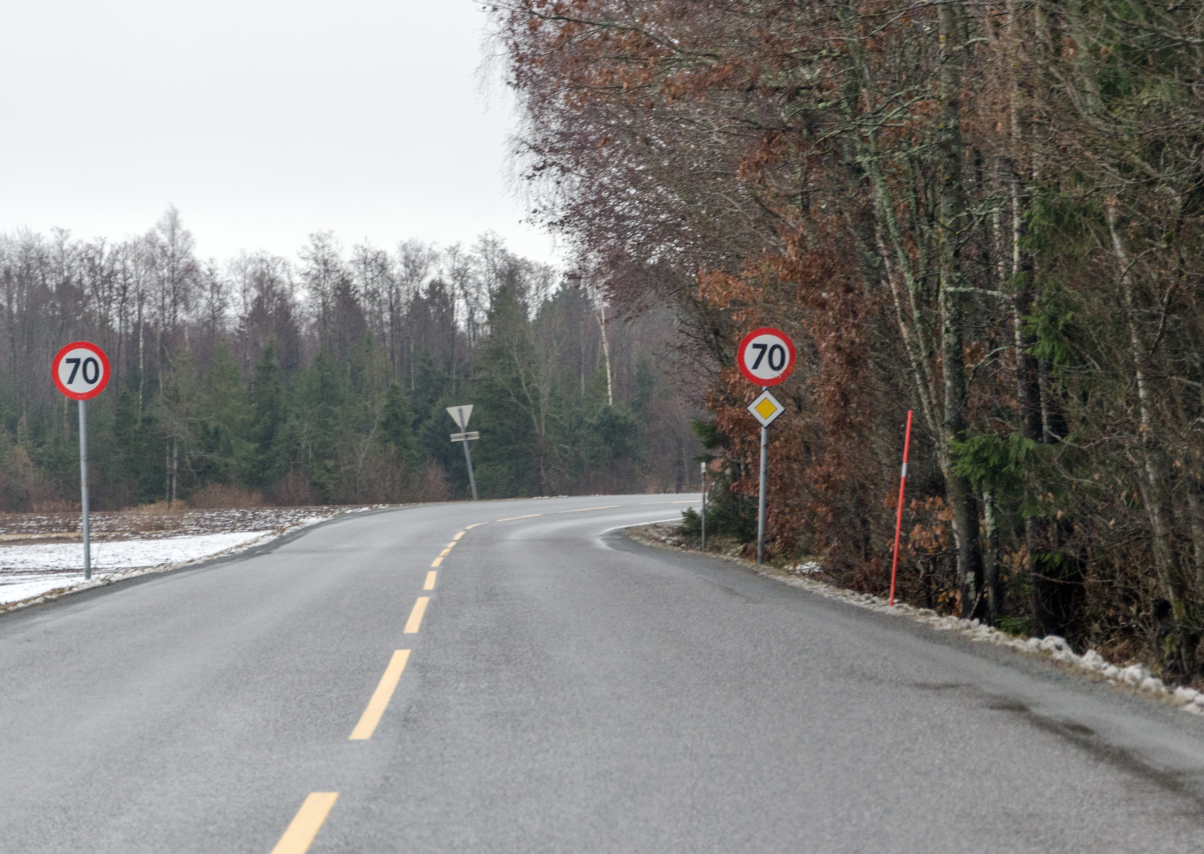 Fylkesvei 55 Humblebakkveien i Larvik